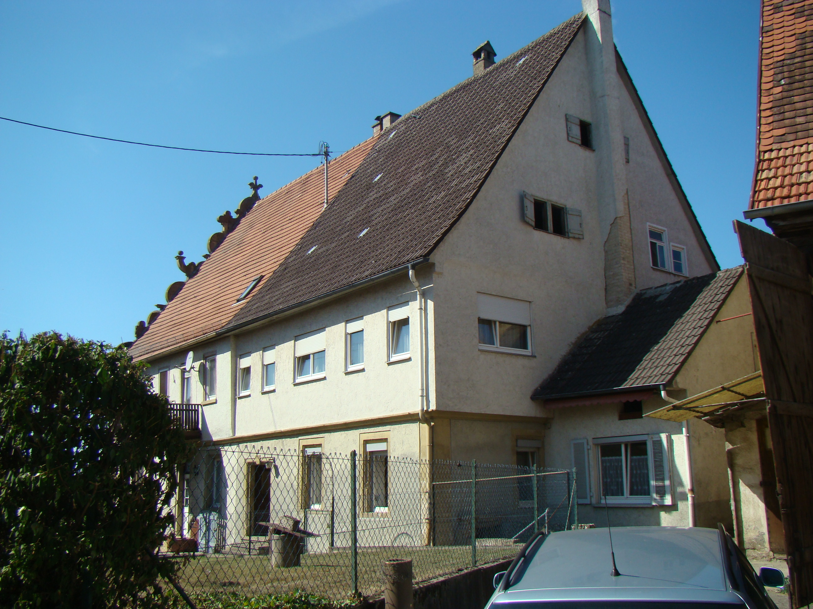 Chanowskysches Schlösschen, Langenbrettach. Rückwärtige Ansicht. Tag des offenen Denkmals